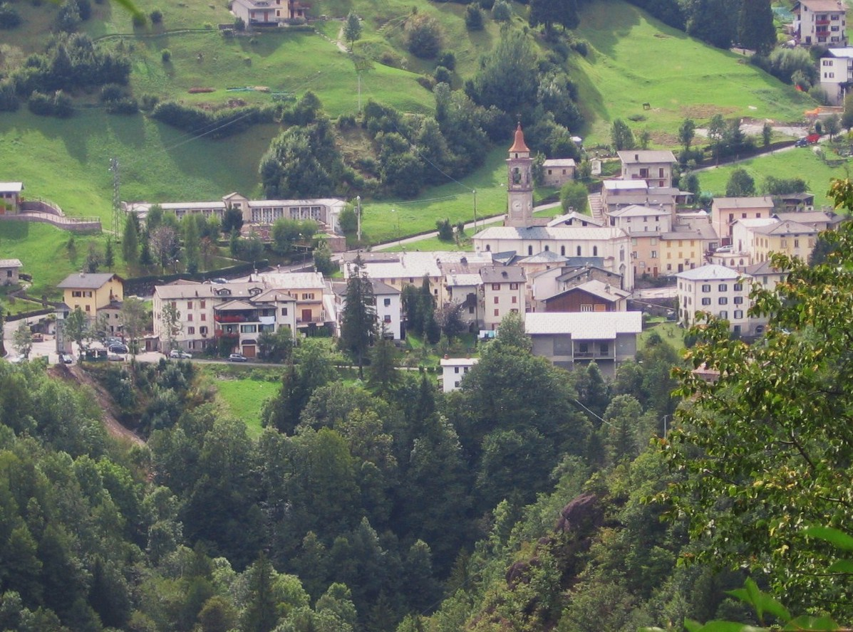 Valtorta, Bergamo, Italy